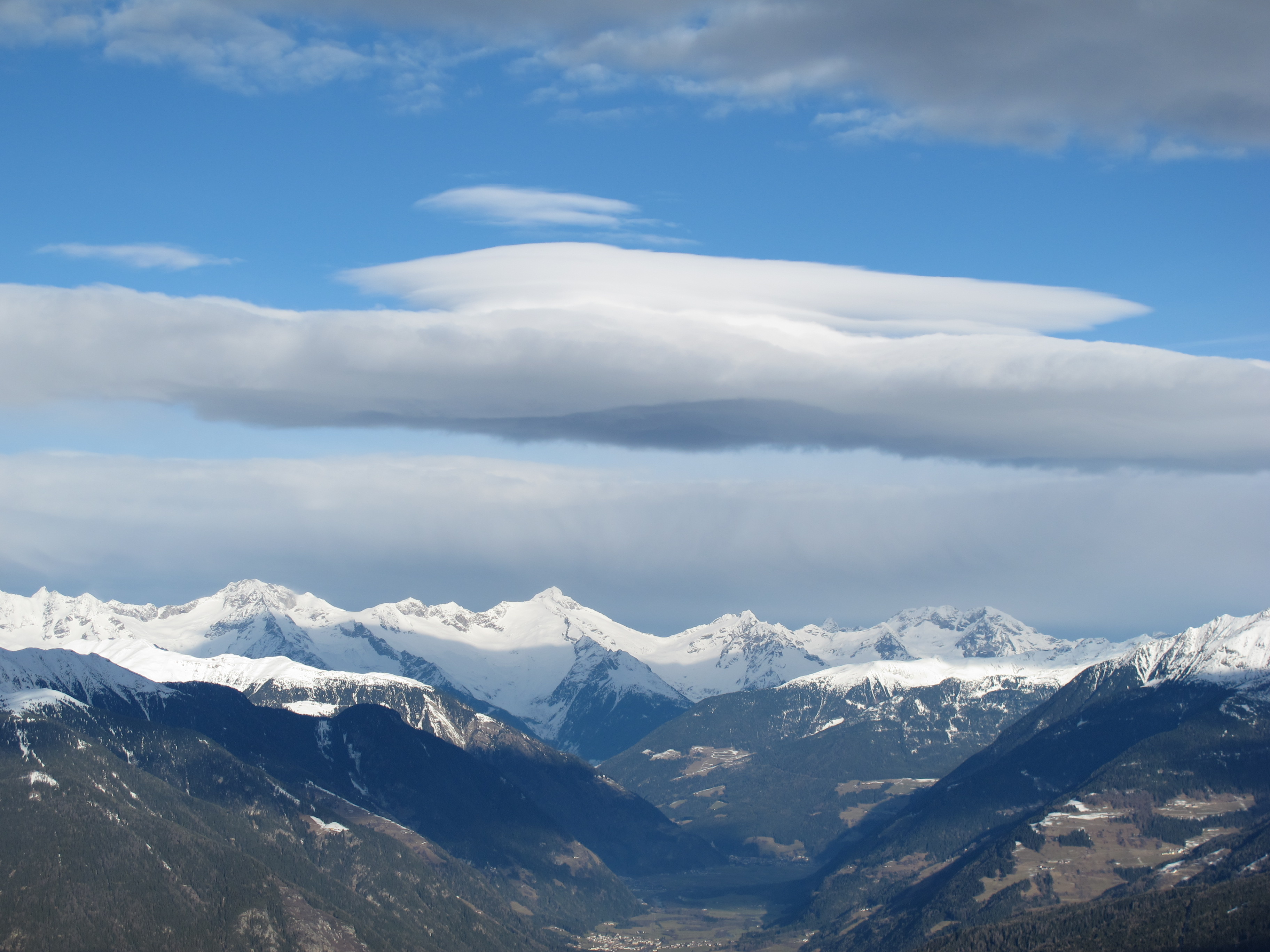 Nordföhn über dem Alpenhauptkamm im Bereich der Zillertaler Alpen. Blick vom Kronplatz mit Ahrntal im Vordergrund.